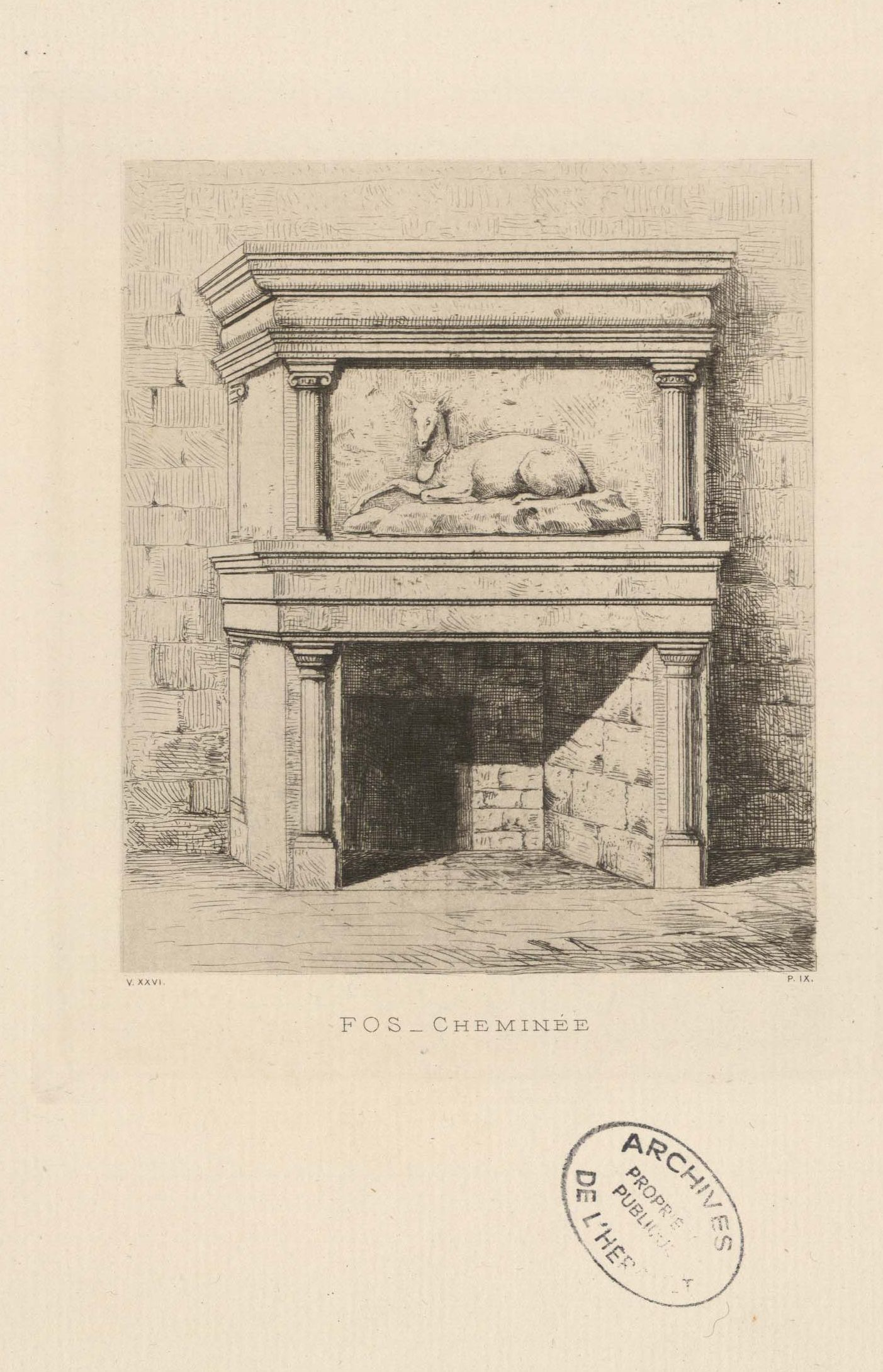 Fos. - Cheminée, p[lanche] IX, "Histoire des communes de l'Hérault" par A. Fabre, eaux-fortes de Lucien Gautier, XXVIe volume, canton de Roujan, [1894 ?]